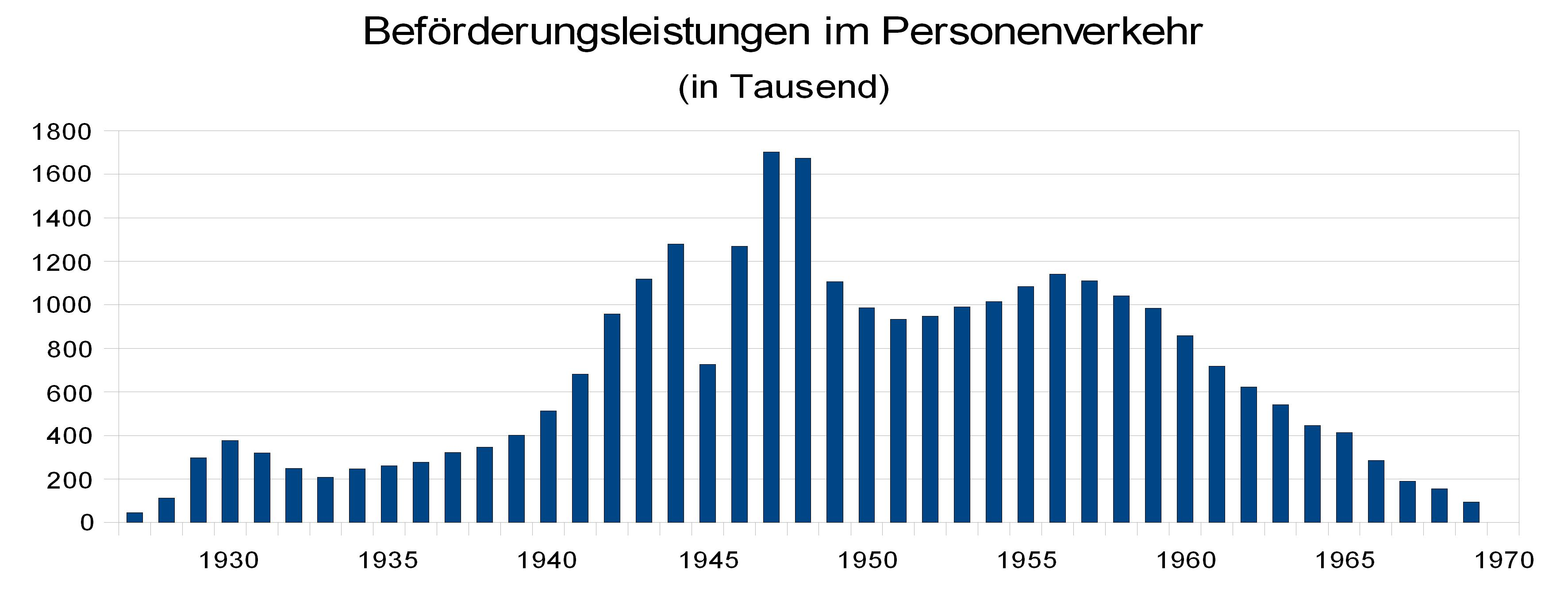 Beförderungsleistungen im Personenverkehr der Extertalbahn, 1927-1969